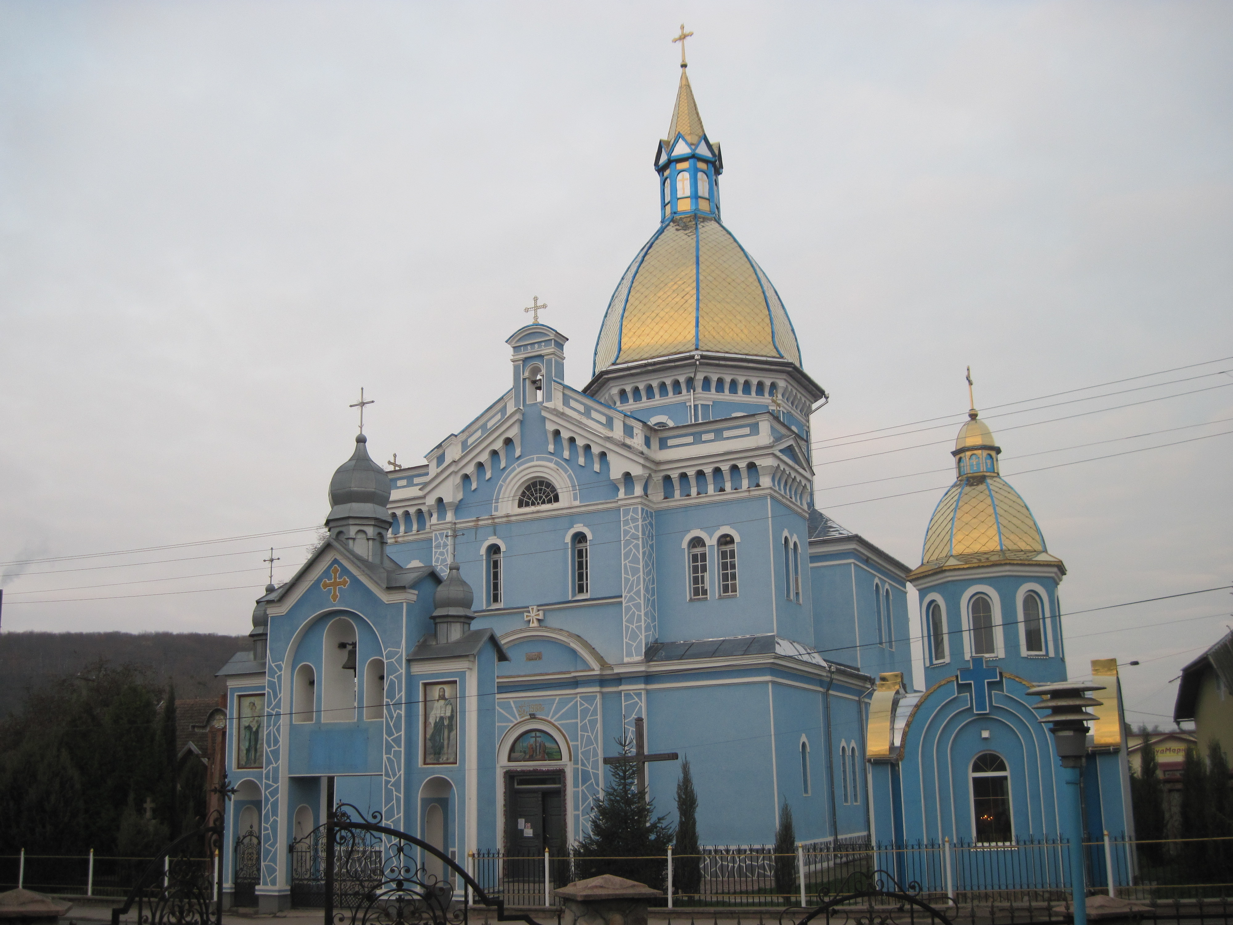 Церква Воздвиження Чесного Хреста, Монастириск, 2014